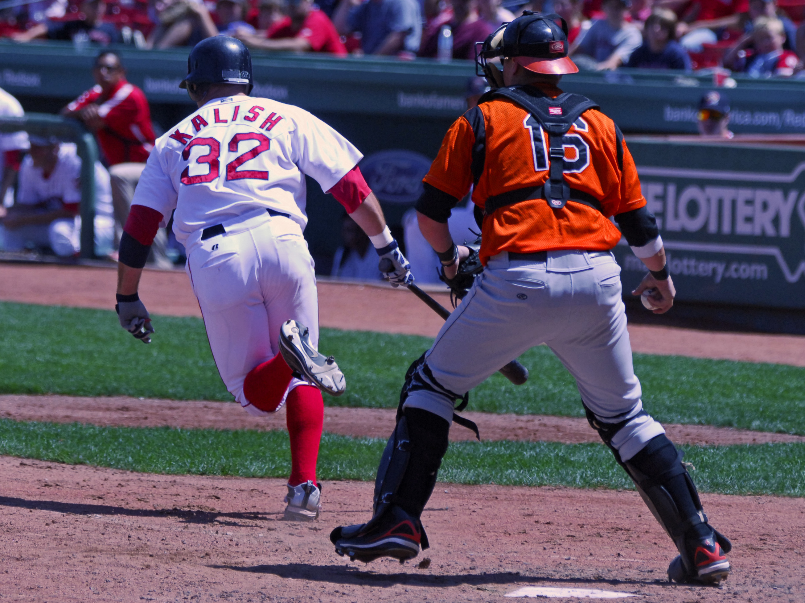 dropped strikeout